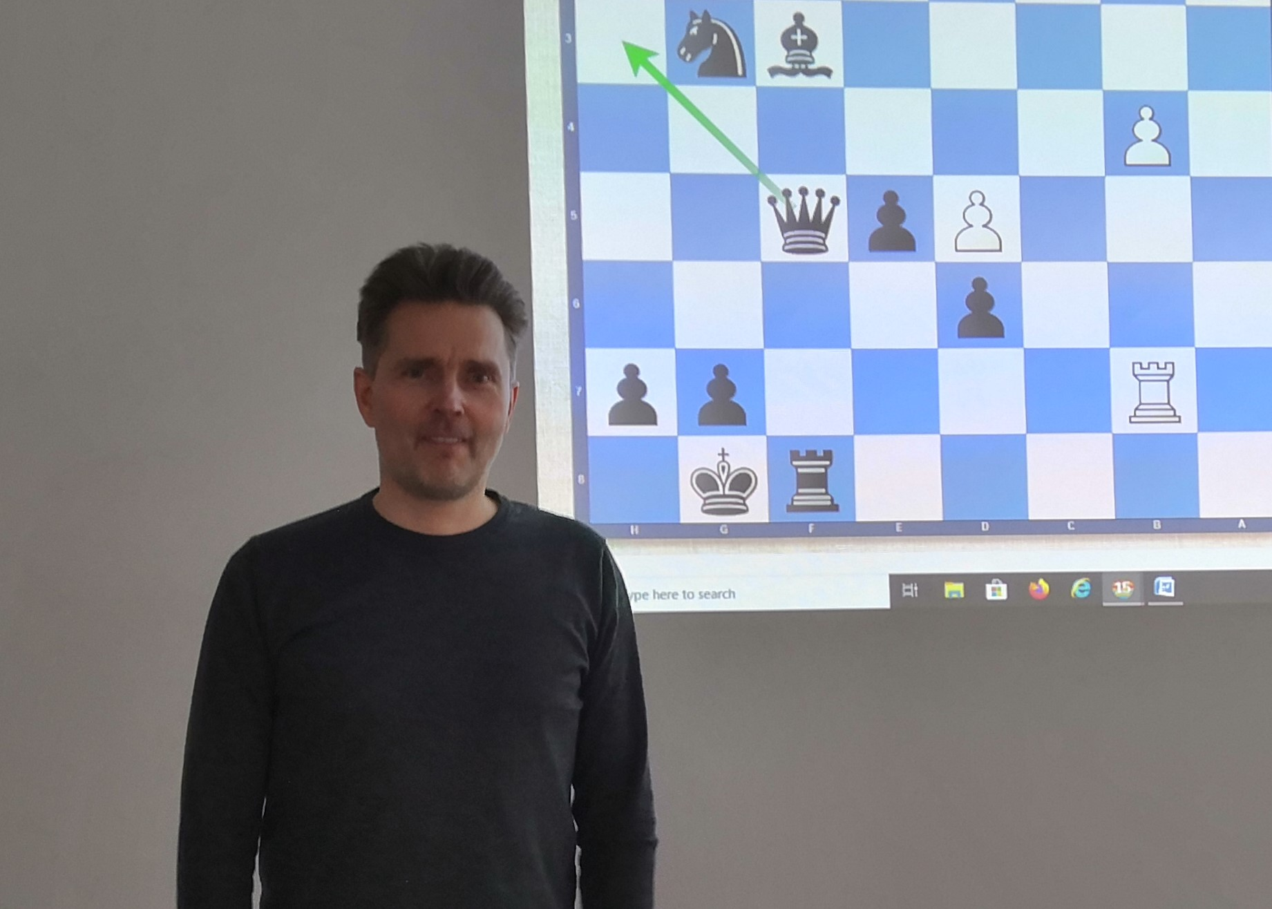 Schach Großmeister Matthias Wahls während seines Seminars "Das Schach Universum Teil 1" beim SC Weisse Dame in Berlin.